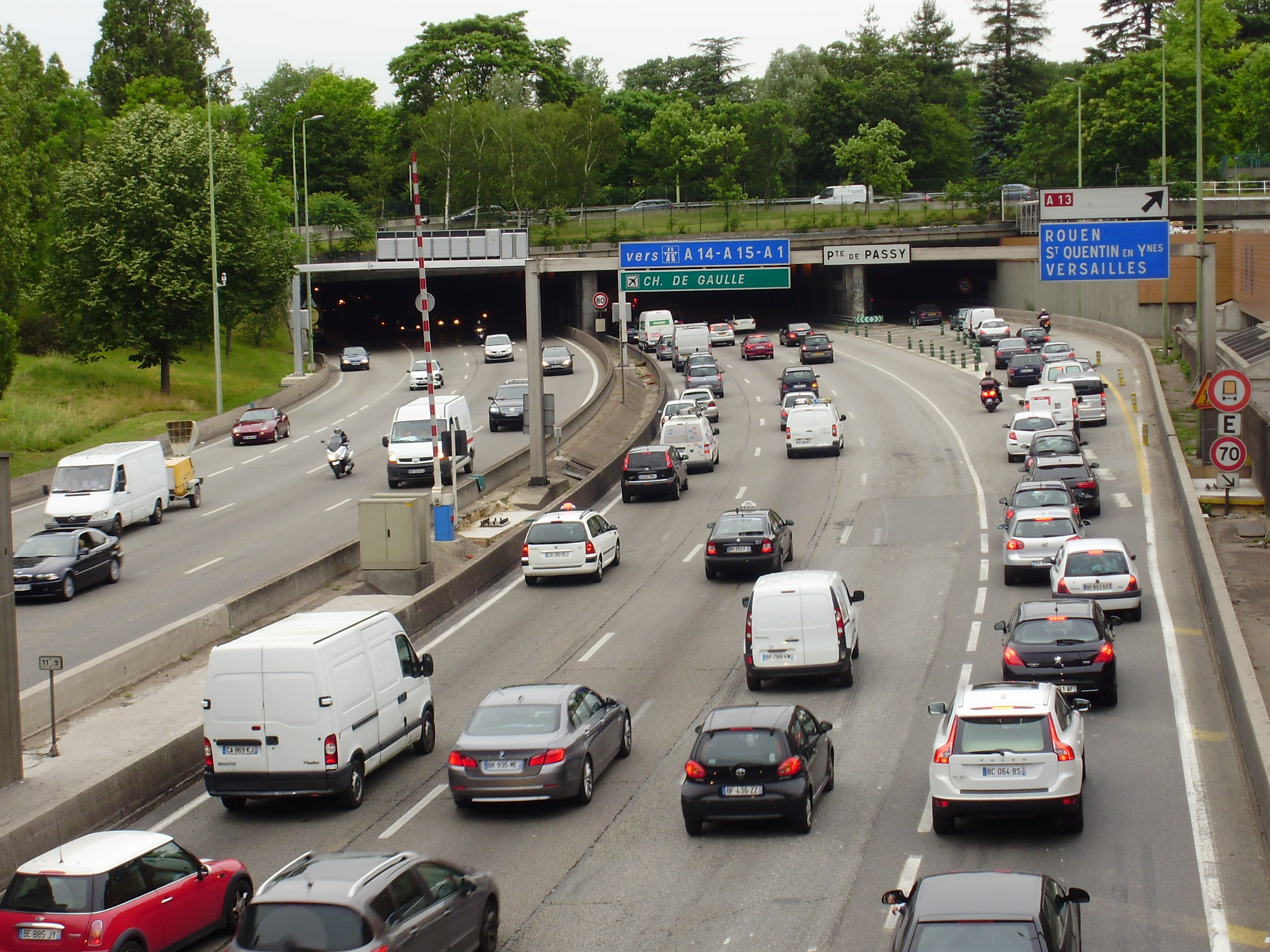 Tunnel de la porte d'Auteuil sur le boulevard périphérique de Paris, France, du côté sud du tunnel, dans le 16e arrondissement de Paris.